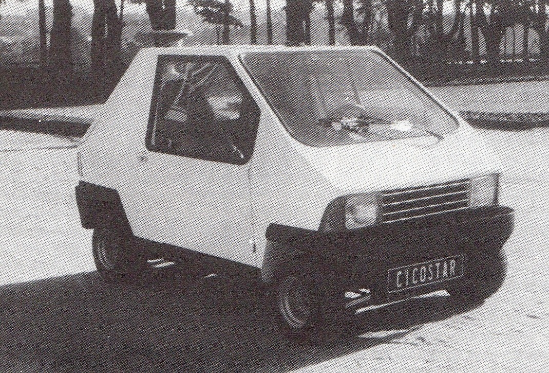 CICOSTAR